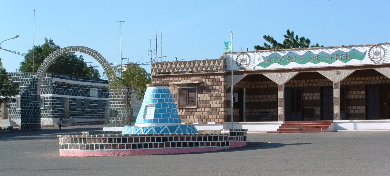 Place Bernard, du nom d'Albert Bernard (1919-1935), commandant du Cercle de Dikhil, mort en défendant la ville des pilleurs, le 18 janvier 1935; à Dikhil, Région de Dikhil, République de Djibouti.